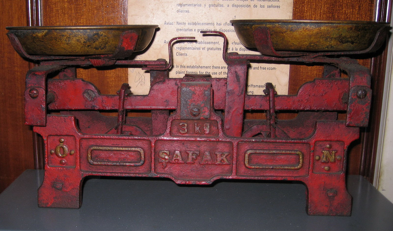 Báscula, Galiza